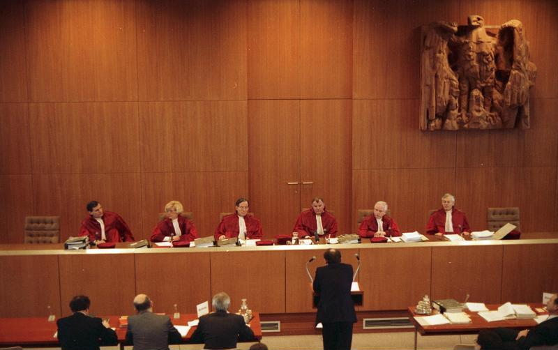 Am 17.1.1989 verhandelte der II. Senat des Bundesverfassungsgerichtes über die Verfassungsmäßigkeit des Bundeshaushaltsgesetzes für 1981. Damals hatte die SPD/FDP-Koalition die Kreditermächtigung für den Haushalt um 1,9 Millarden DM höher angesetzt als die für Investitionen vorgesehenen Ausgaben. Da nach Meinung der damaligen Opposition, der CDU/CSU-Bundestagsfraktion, hiermit gegen Artikel 115 des Grundgesetzes verstoßen wurde, hatten 231 Abgeordete der CDU/CSU-Fraktion am 6.9.1982 den Antrag beim Bundesverfassungsgericht gestellt, die Bestimmung über die damalige Kreditermächtigung für verfassungwidrig zu erklären. Artikel 115 verpflichtet, die Verschuldung unterhalb der für Investitionen vorgesehenen Ausgaben zu halten. Die Entscheidung in diesem "Abstrakten Normenkontrollverfahren" soll am 18. April 1989 verkündet werden.